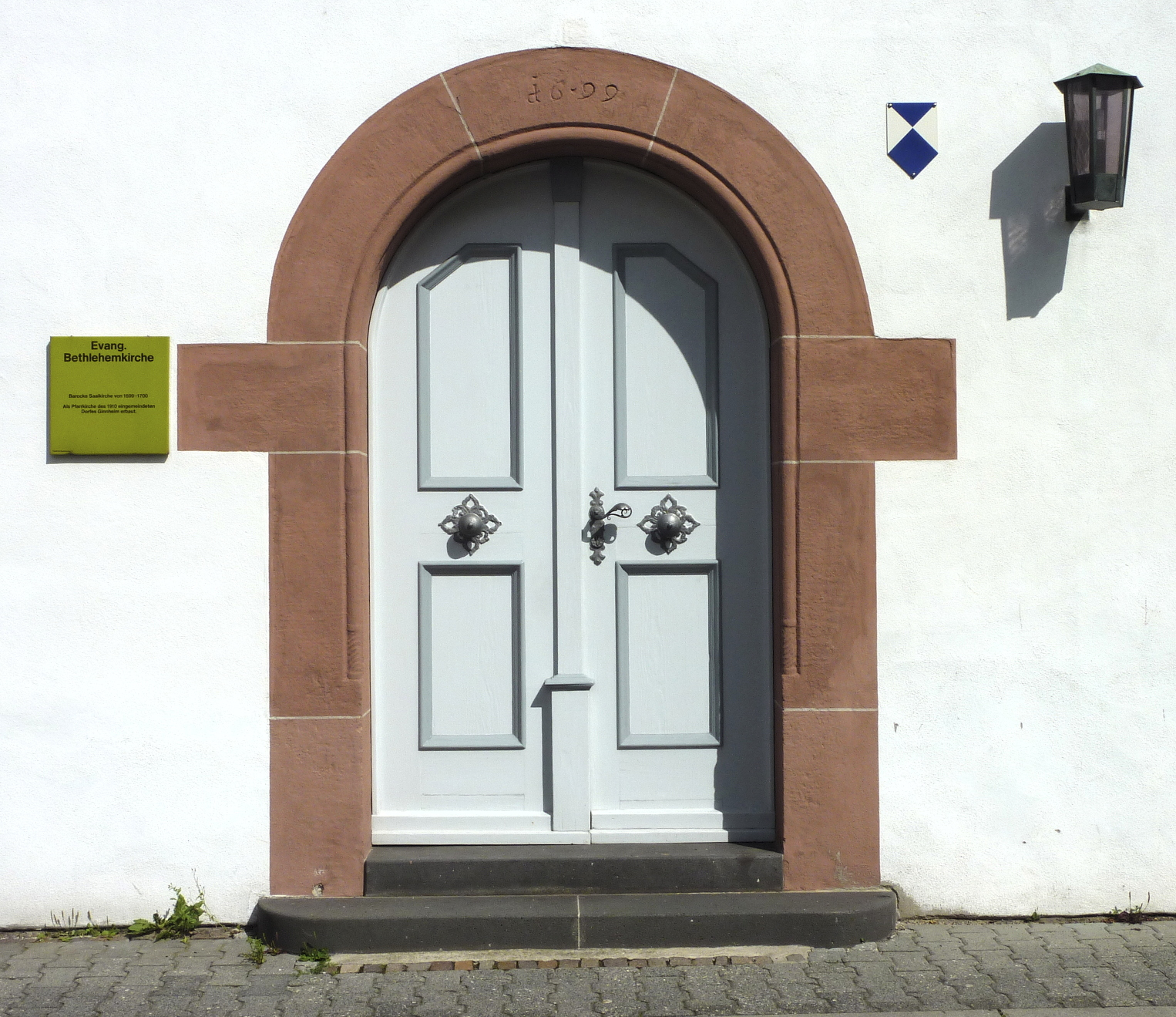 Frankfurt am Main, Stadtteil Ginnheim: Die Alte Bethlehemkirche ist eine von 1699 bis 1700 als evangelisch-lutherisches Gotteshaus erbaute barocke Saalkirche im Ortsteil Alt-Ginnheim. Der Kirchenbau entstand als Folge der Bikonfessionalität vom 17. bis zum 18. Jahrhundert – evangelisch lutherisch und evangelisch-reformiert – des damals zur Grafschaft Hanau-Münzenberg gehörenden Dorfes. Das Foto zeigt das Hauptportal der Kirche in deren westlicher Fassade